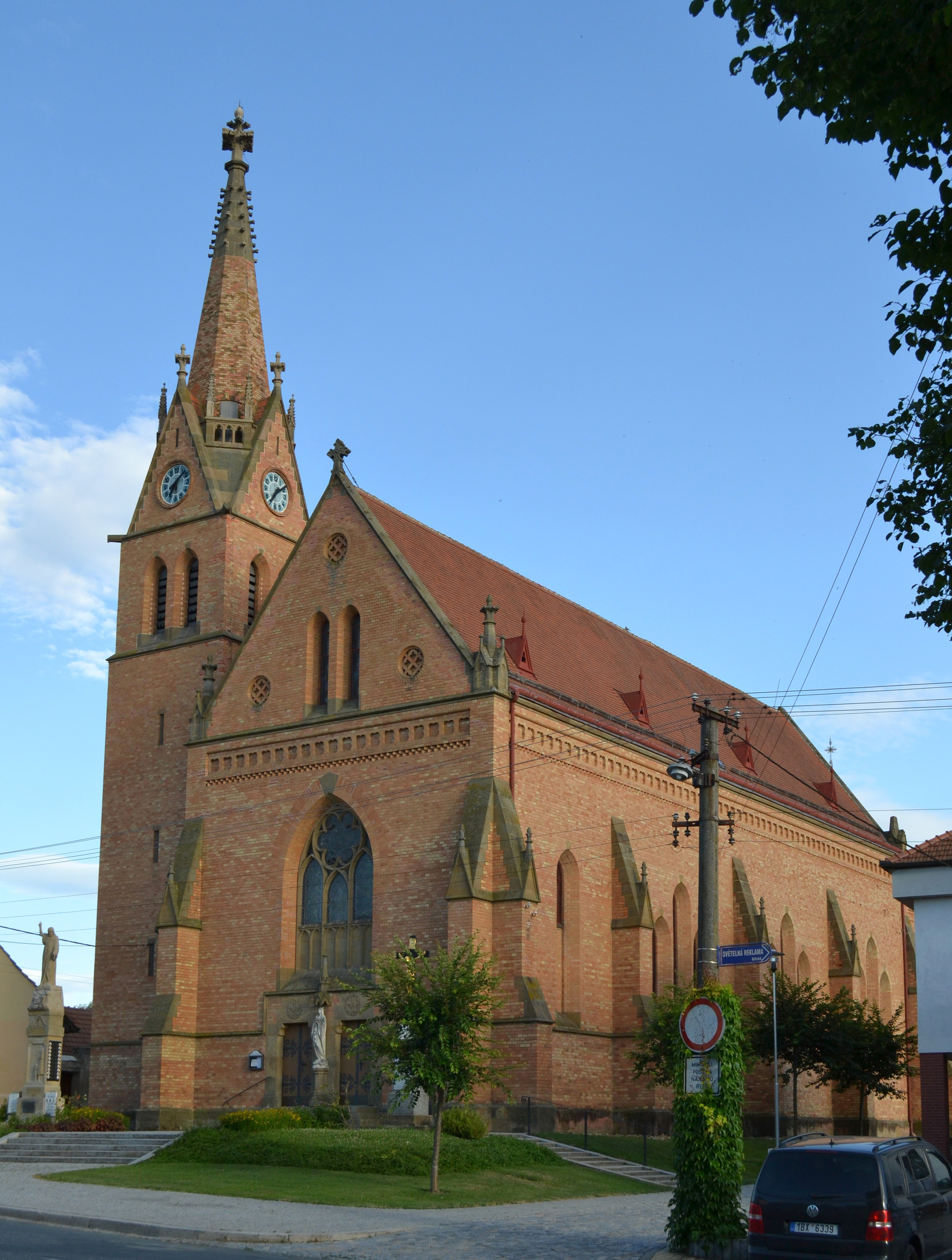 Uherčice (okres Břeclav) - kostel sv. Jana Křtitele